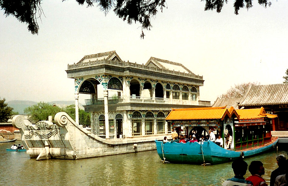 Source: Peking: Summerpalast1